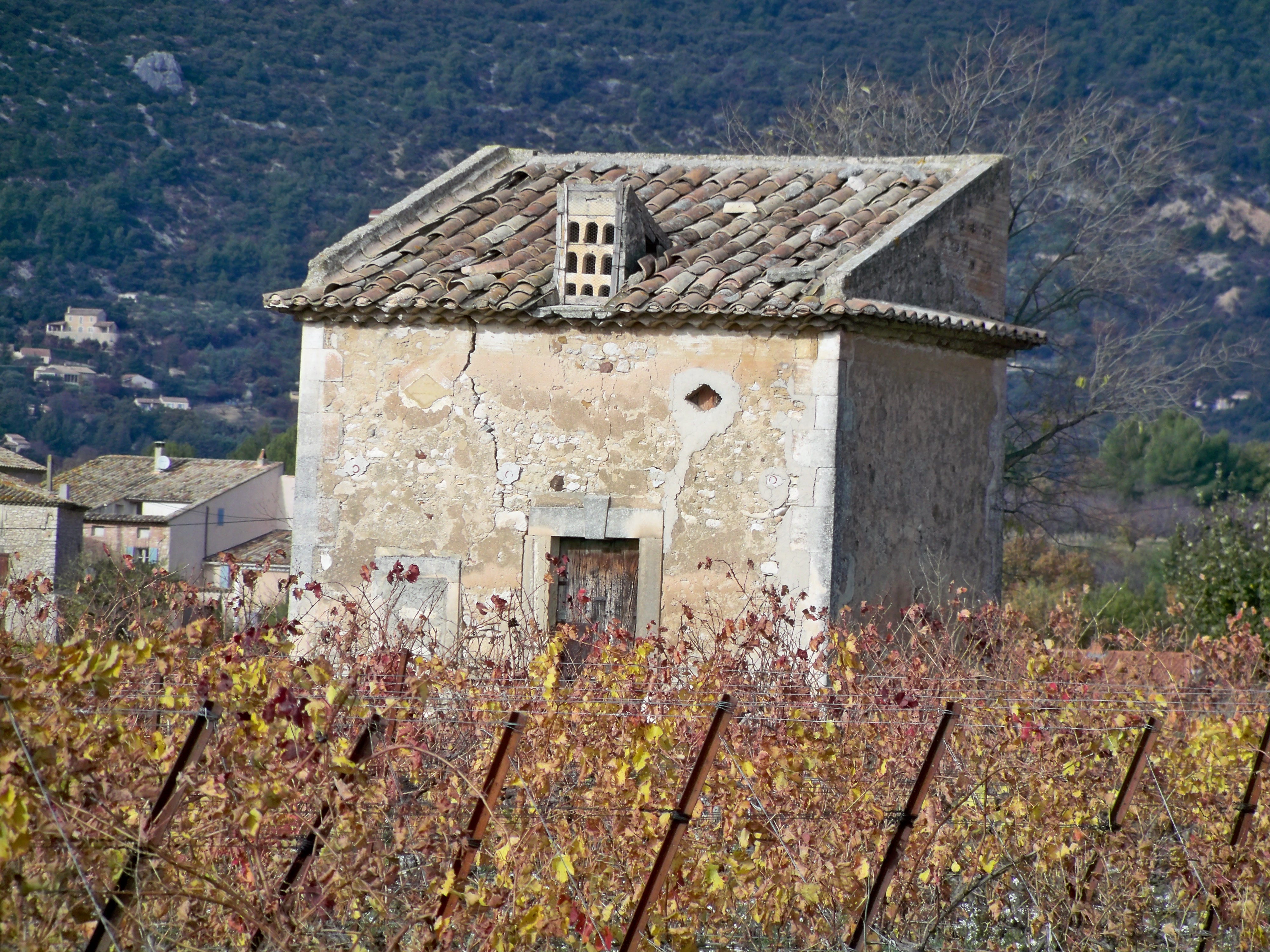 pigeonnier à Villars, Vaucluse, France